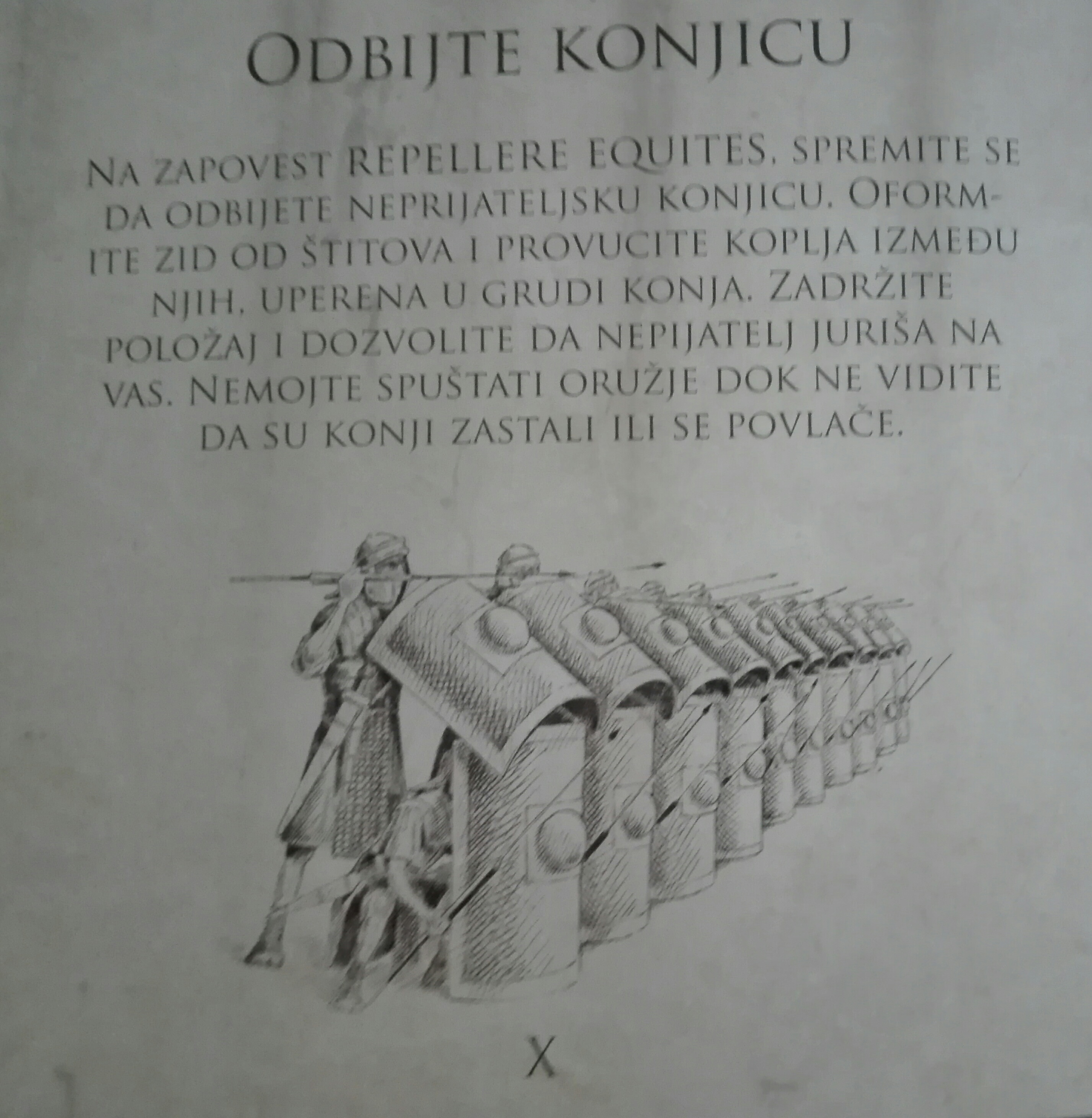 Формација против коњице